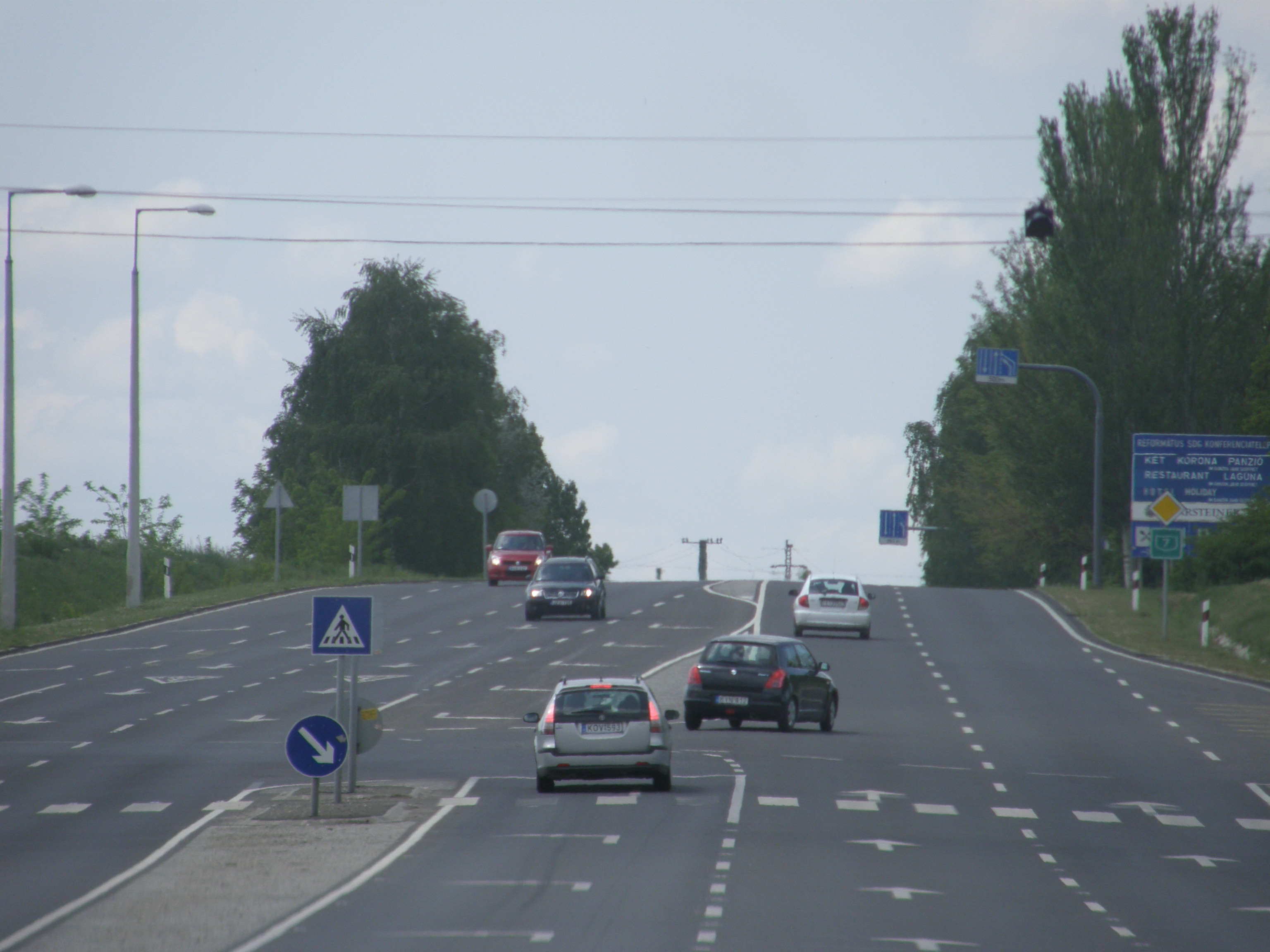 Road 7 - Hungary